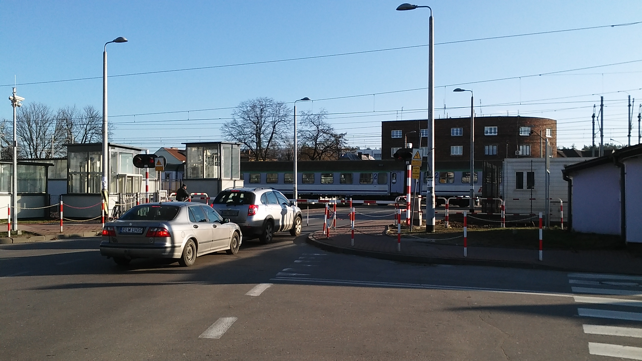 przystanek kolejowy Kobyłka - widok na przejazd kolejowy od strony północnej; na torach pociąg pospieszny TLK 11105 Narew relacji Warszawa Zachodnia - Białystok